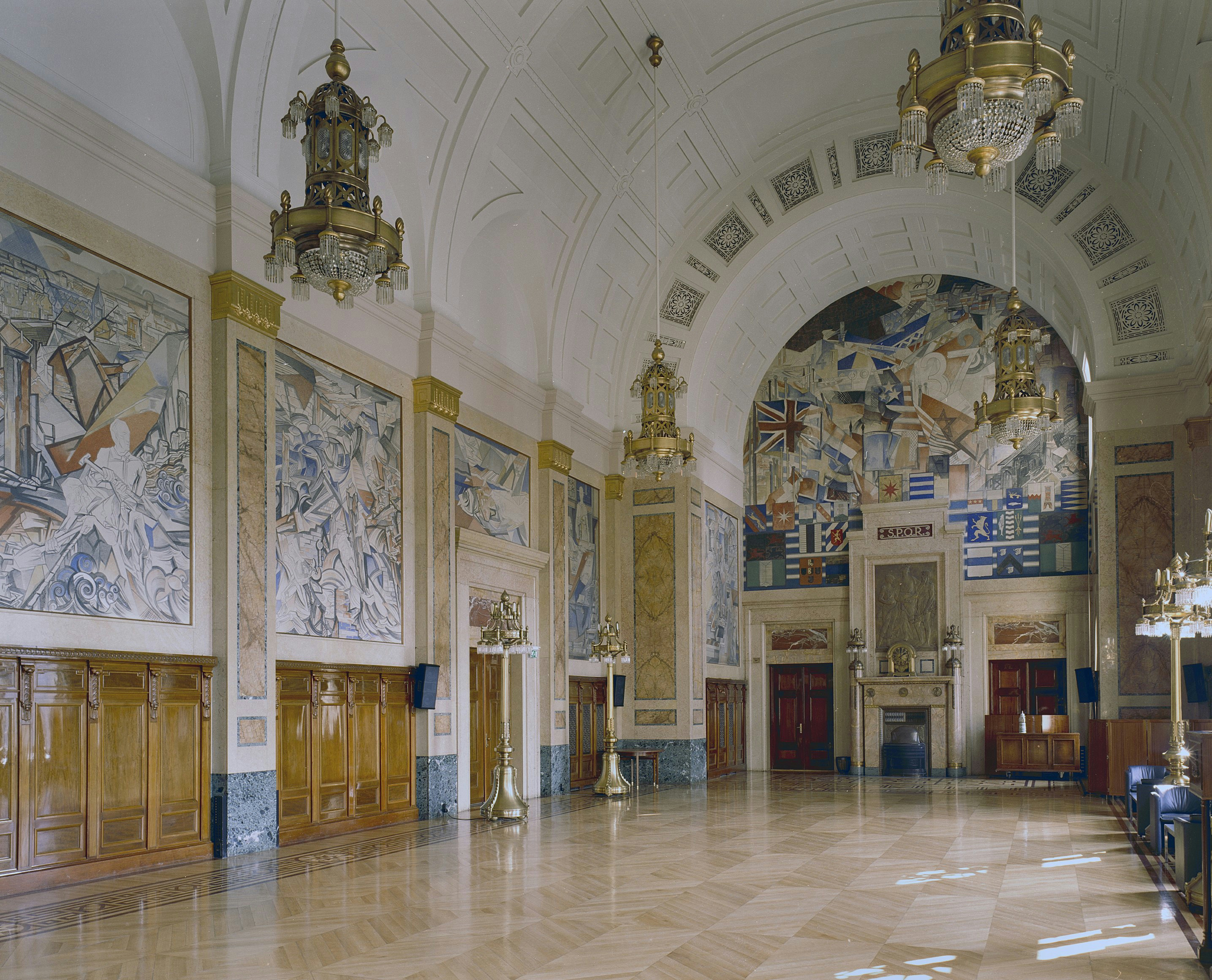 Zicht op een deel van het interieur van het stadhuis van Rotterdam, overzicht Burgerzaal